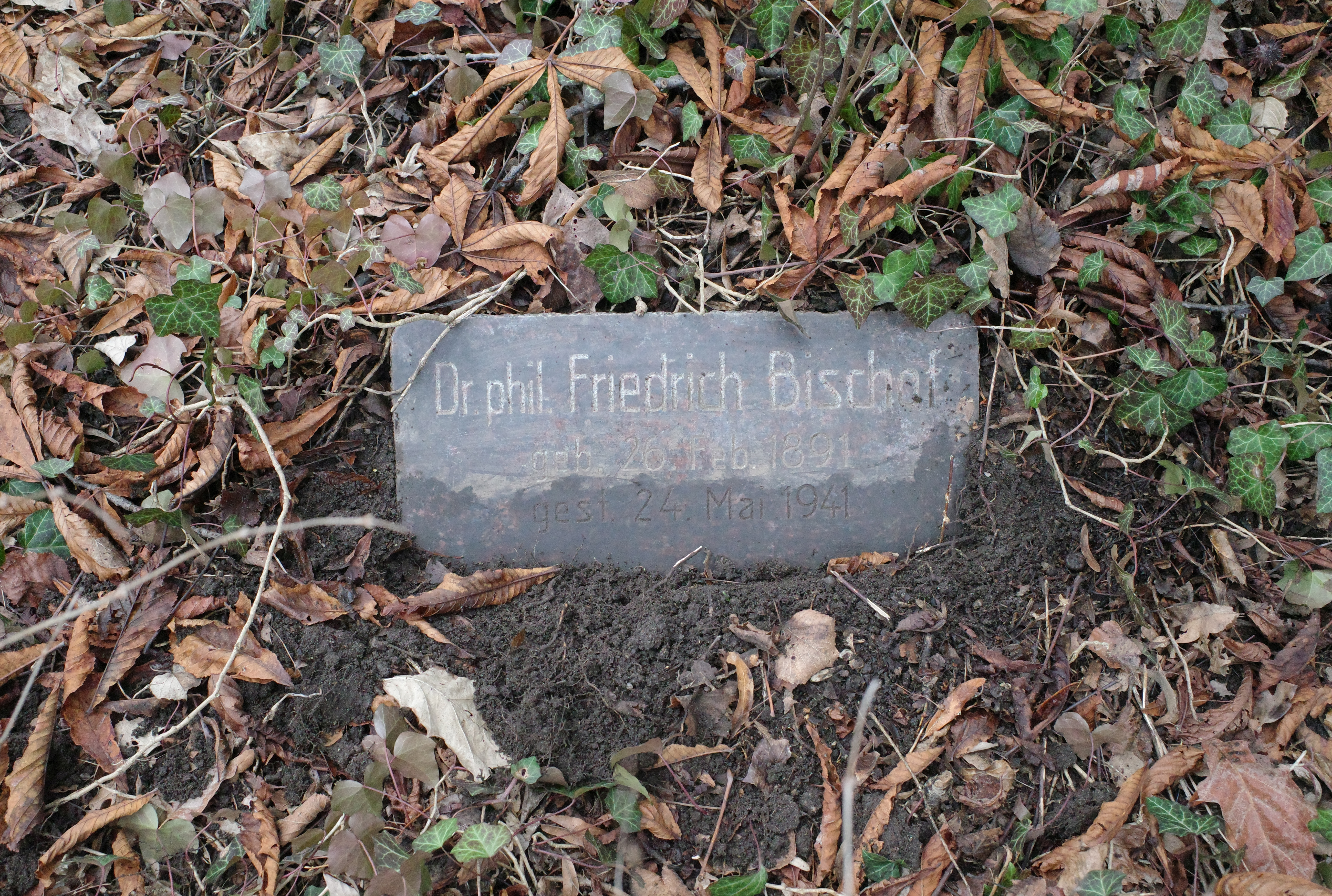 Dessau, Friedhof 3. Ruhestätte von Dr. phil. Friedrich Bischof.